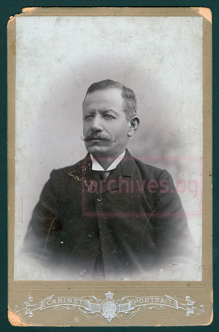 Nikola Varbenov from Embore